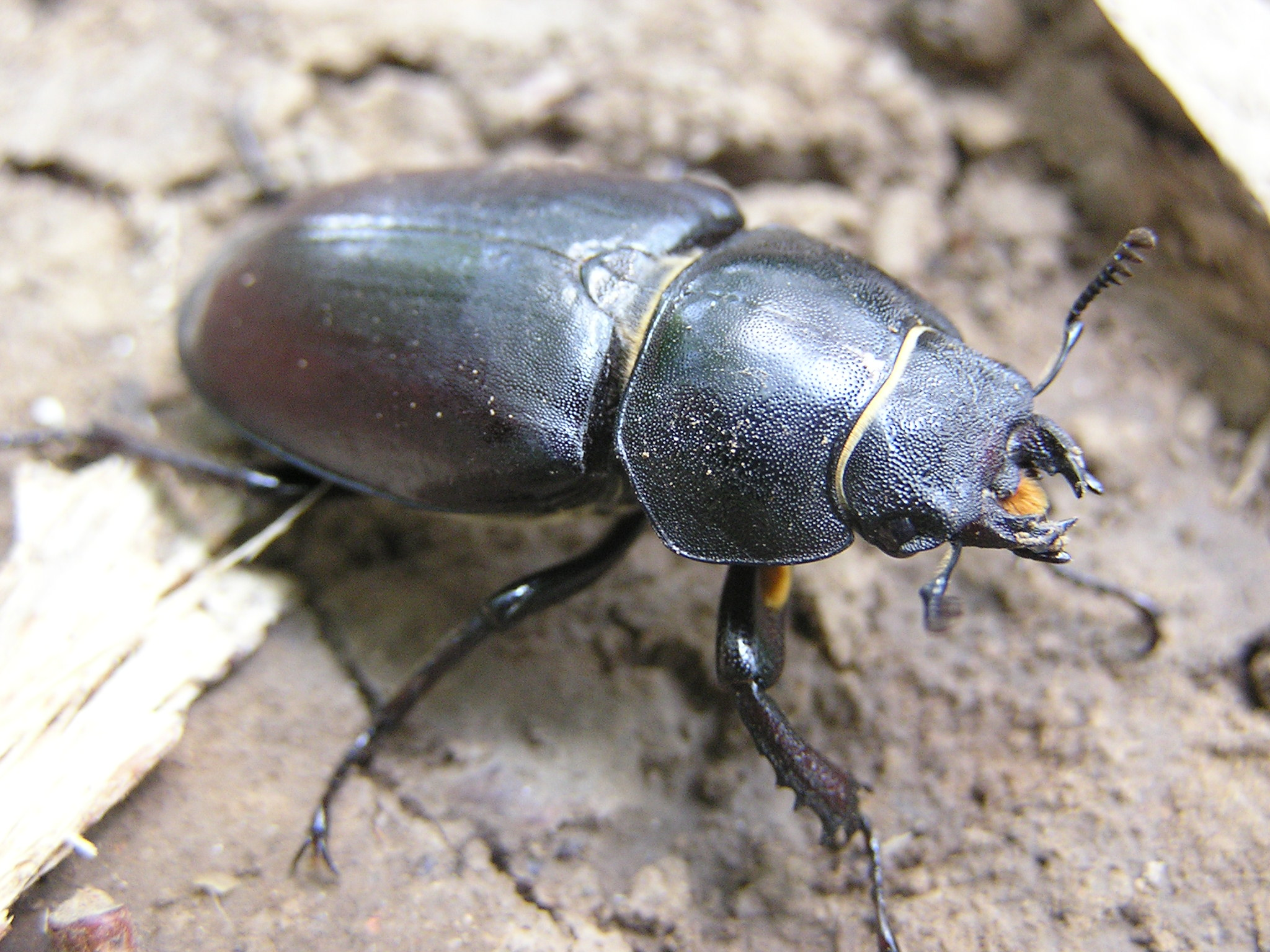 Lucanus cervus